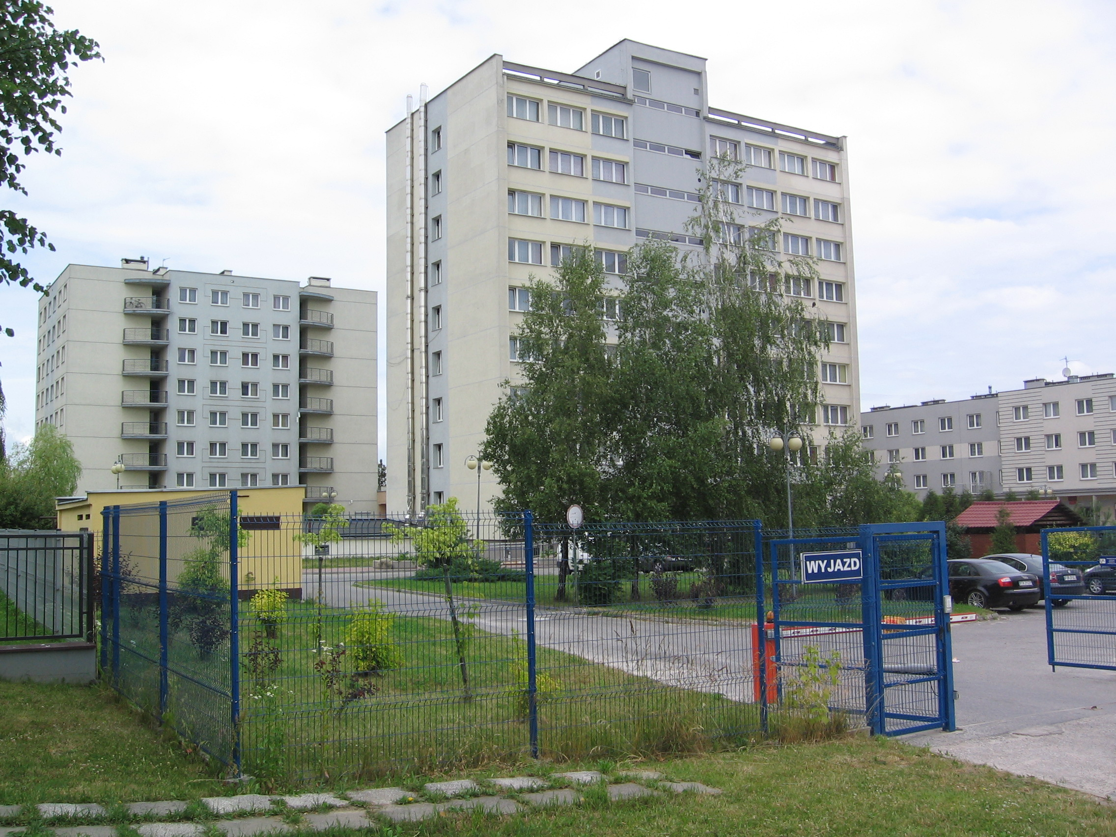 Domy Studenta Uniwersytetu Jana Kochanowskiego w Kielcach przy ul. Śląskiej.